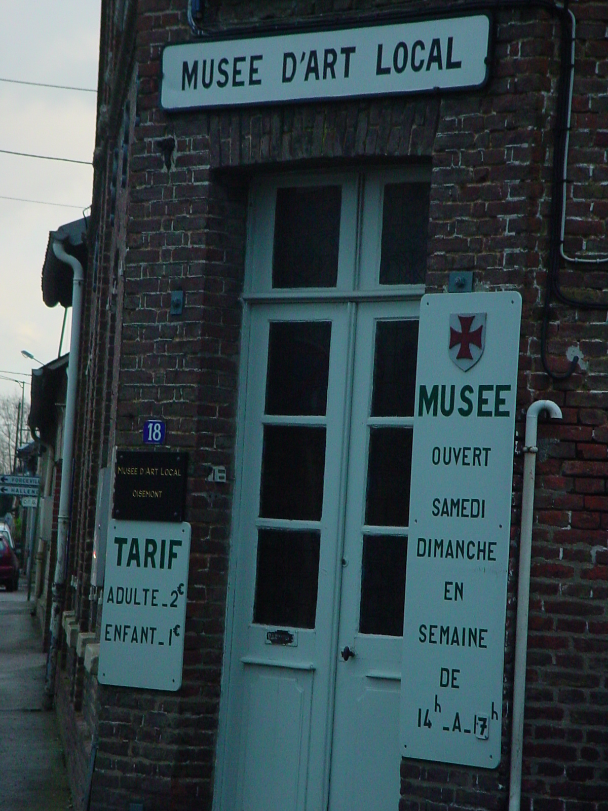 Musée d'Oisemont, Somme (80), France.